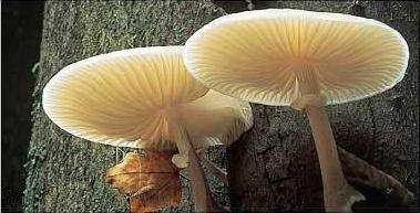 O cogumelo Oudemansiella nocturnum se alimenta de sujeira